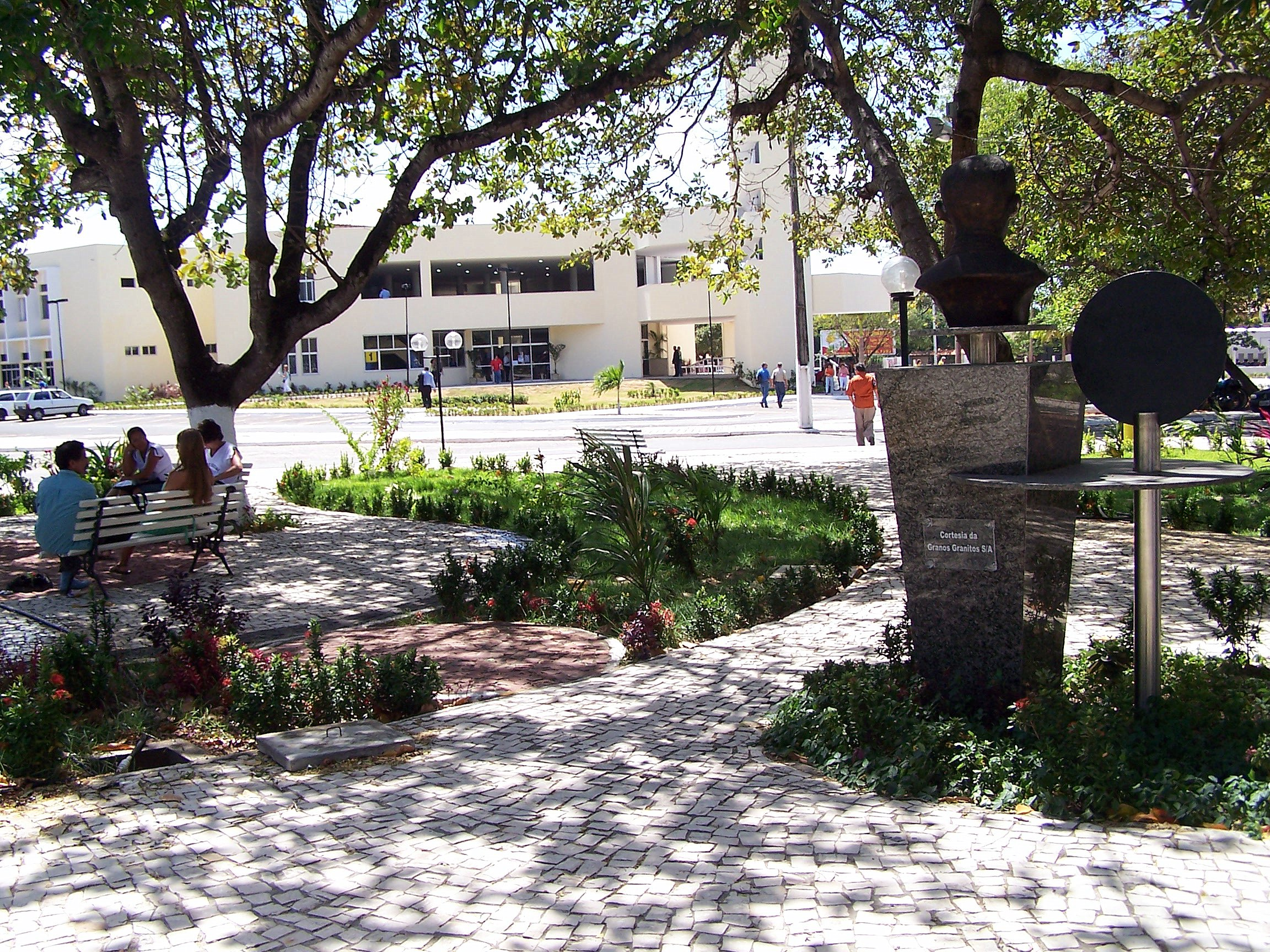 Ao fundo o predio da reitoria e em primeiro plano a praça da entrada do campus do Itaperi